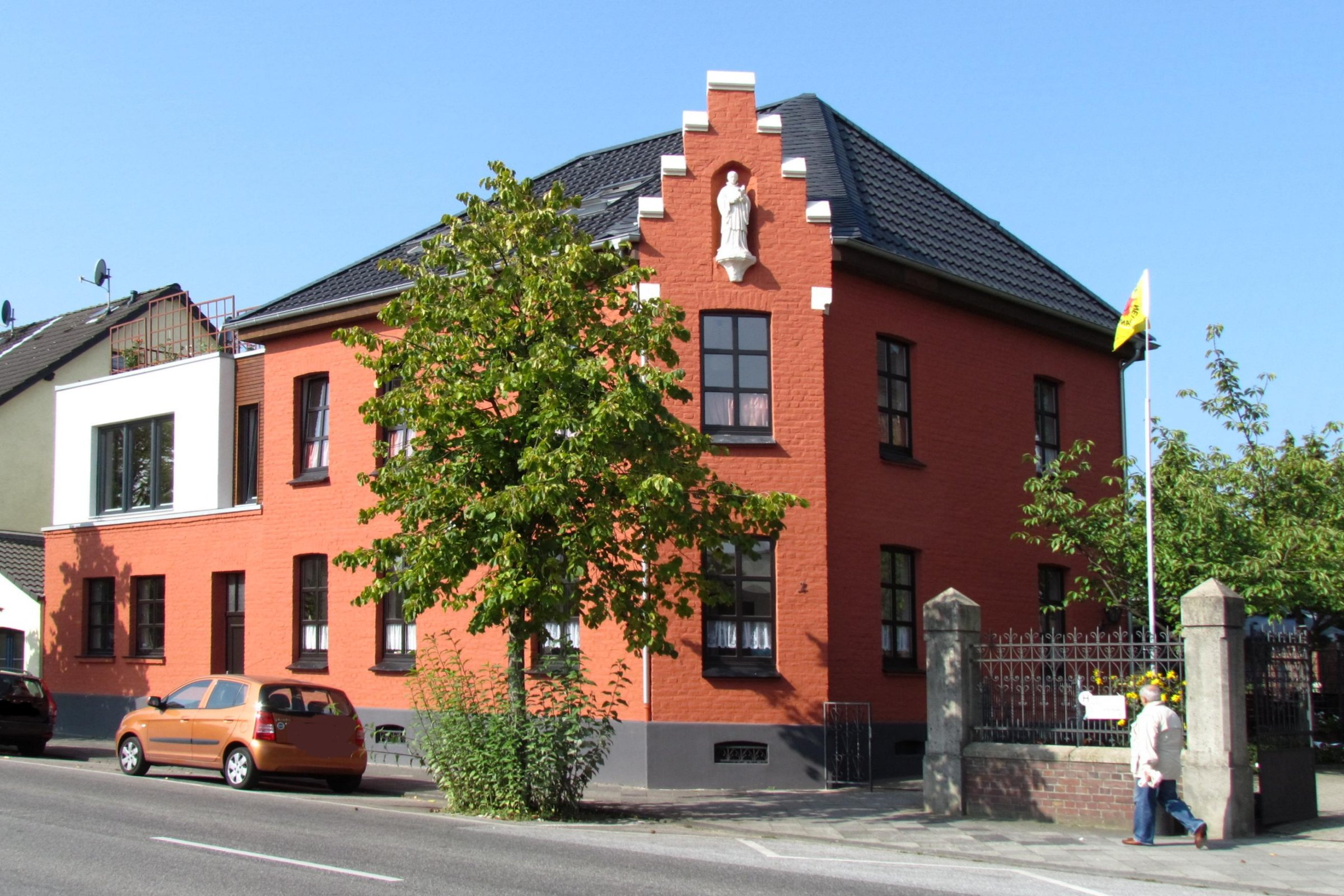 Denkmal in Mönchengladbach